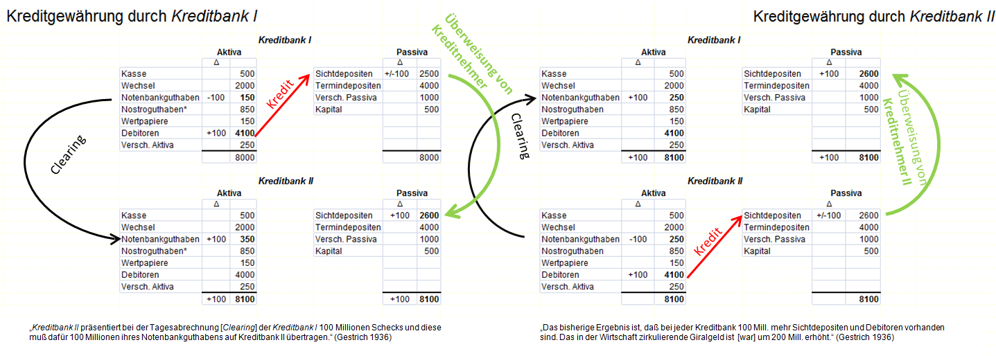 Abb. zeigt Bilanzbilder zweier Kreditgewährungen zweier Kreditbanken (Kreditgewährung im Gleichschritt): Dadurch bleiben beide Kreditbanken liquide, beider Notenbankguthaben hat sich am Ende des Tages („Forderungen/Verbindlichkeiten-Clearing“) nicht verändert. Nur unter der theoretischen Bedingung der Kreditgewährung im Gleichschritt ist eine unabhängige Giralgeldschöpfung aller Kreditinstitute („Geldschöpfung aus dem Nichts“) möglich.